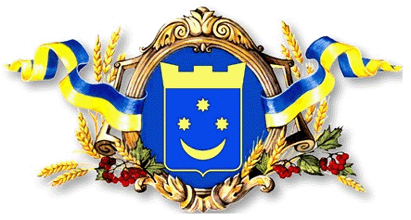 Герб Теребовлянського району